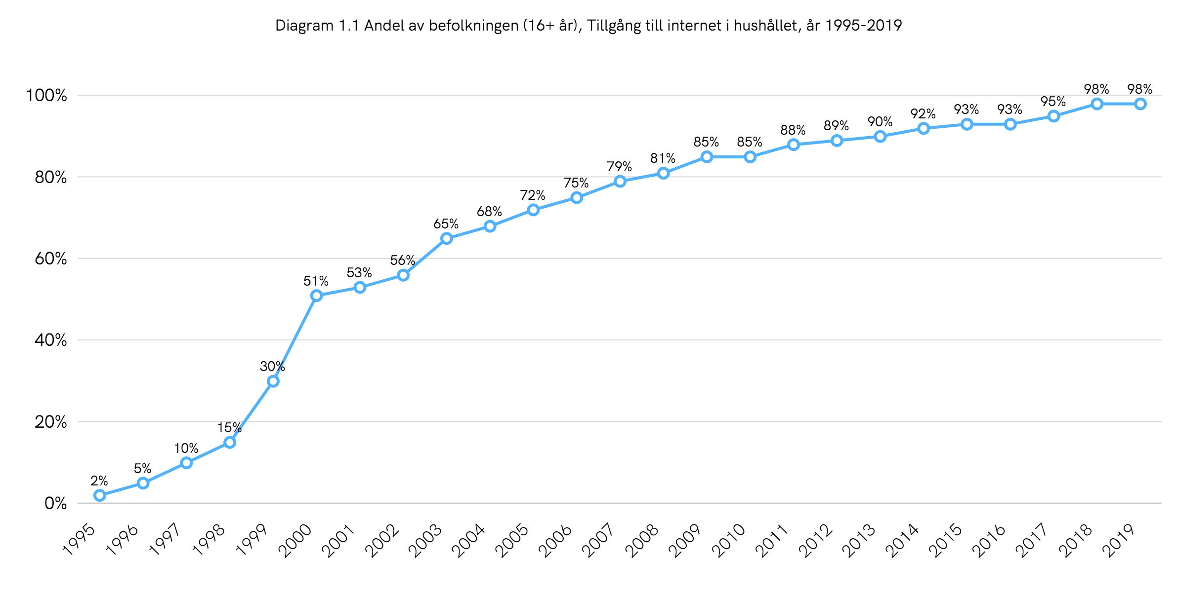 Andel av Sveriges befolkning (16+ år) som hade tillgång till internet i hushållet 1995–2019. Siffror från undersökningen "Svenskarna och internet".